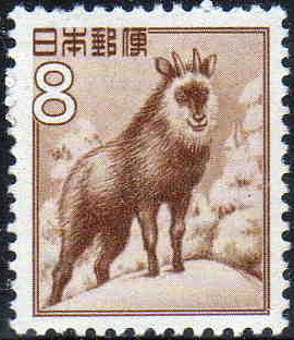 カモシカを描く8円切手。